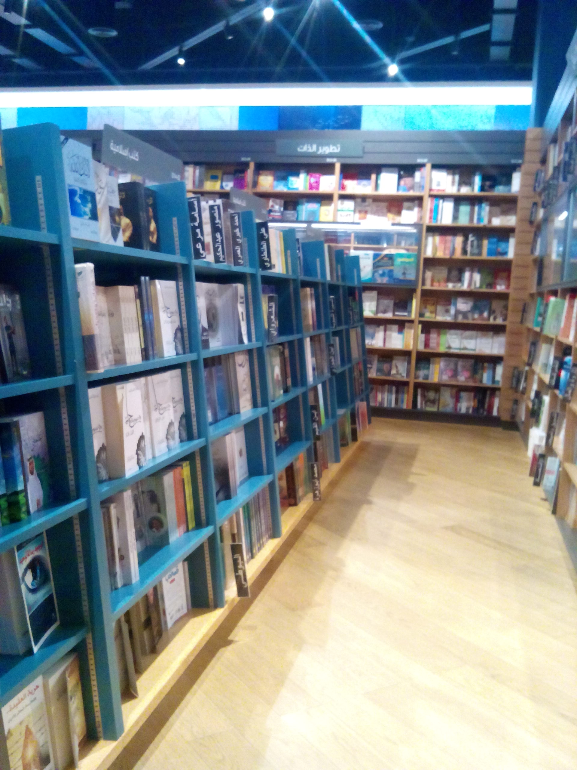 مكتبة ومتجر تعرض فيه الكتب على رفوف مصنفة حسب نوعها للبيع في دبي